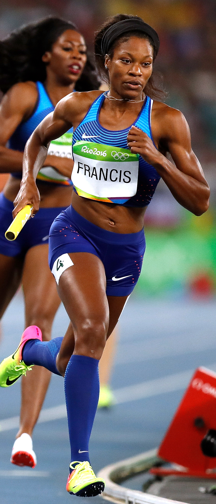 Rio de Janeiro - Eliminatórias do revezamento 4 x 400m nos Jogos Rio 2016, no Estádio Olímpico (Fernando Frazão/Agência Brasil)